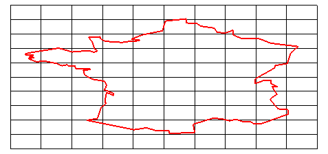 france par affinité r ferreol